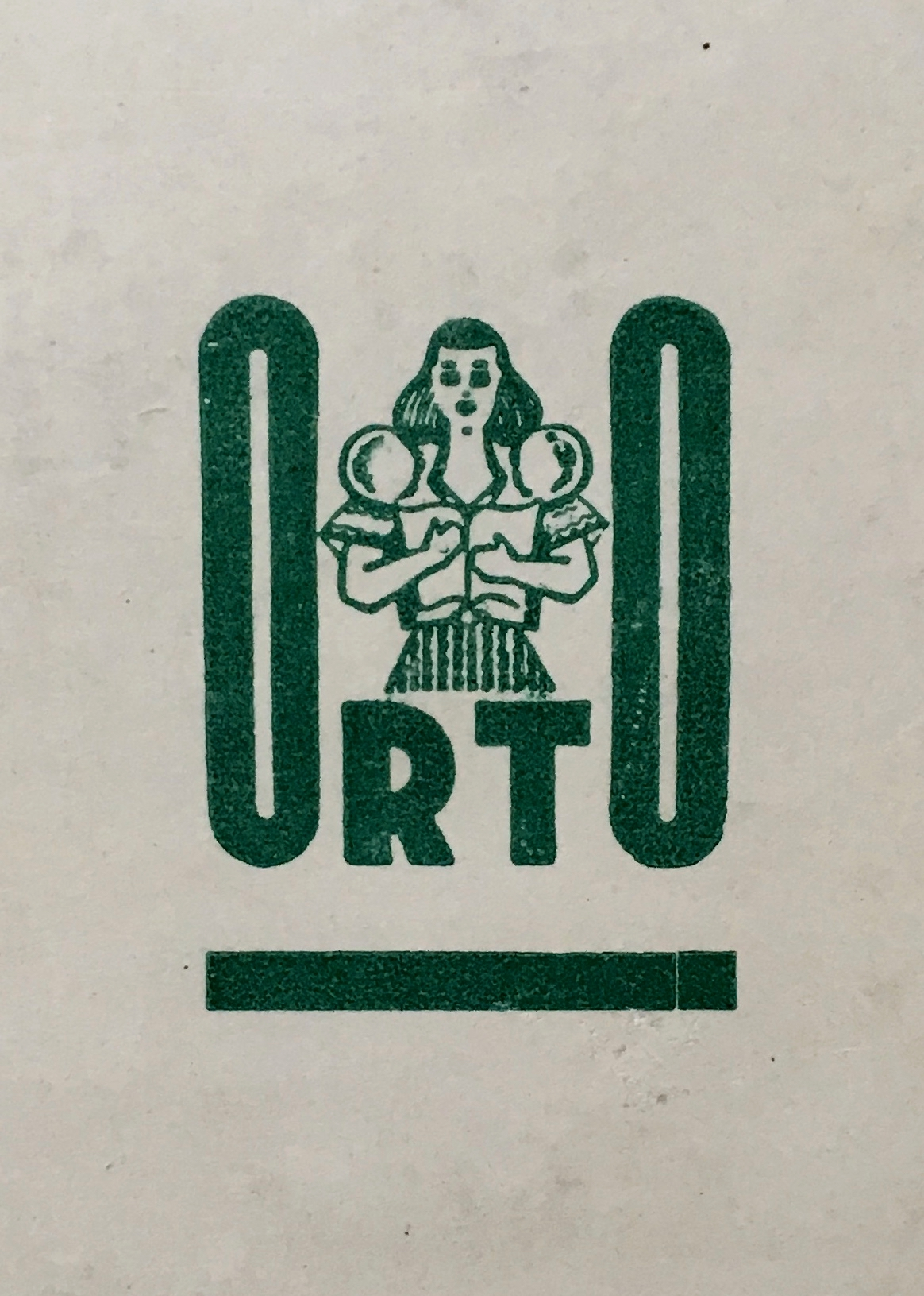 Orto vana logo